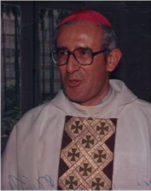 Obispo Emérito de Villavicencio